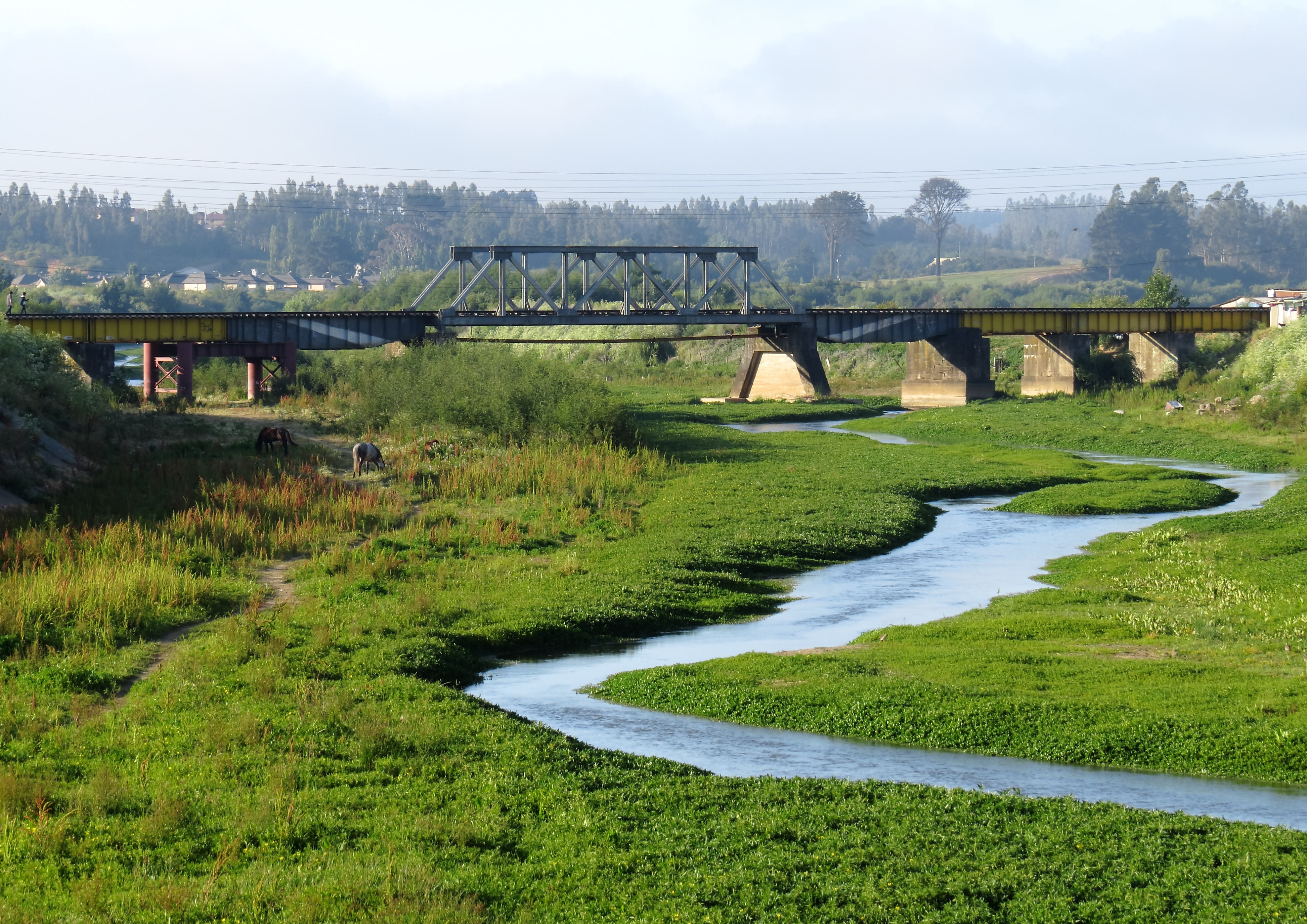 Puente Ferroviario sobre el río Andalién.